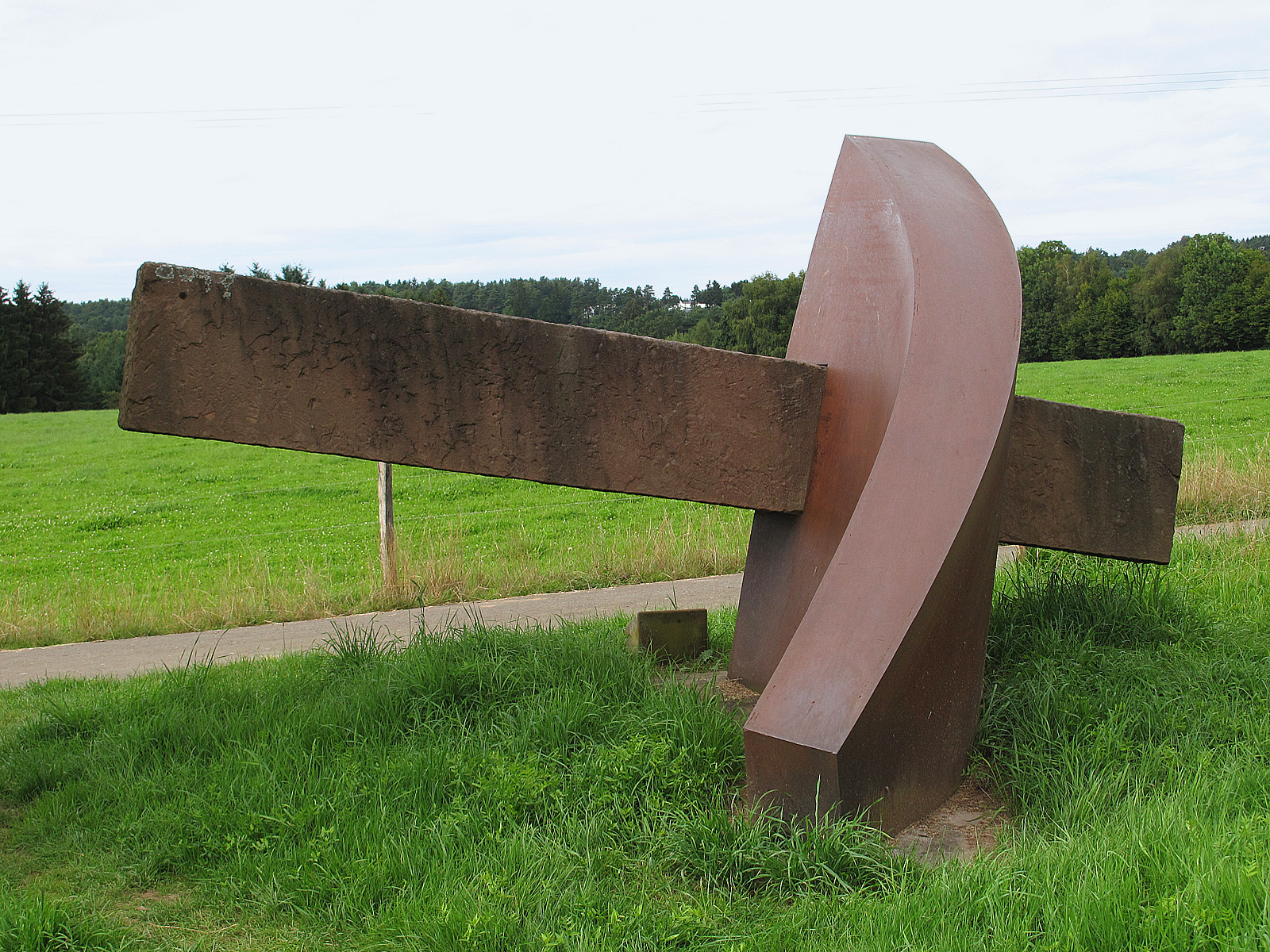 Hartmut Stielow, Balance, 1996, - Deutschland, Rheinland-Pfalz, Skulpturenweg Trippstadt-Stelzenberg